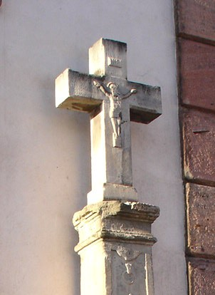 Crucifix de remplacement de la croix du Pâquis